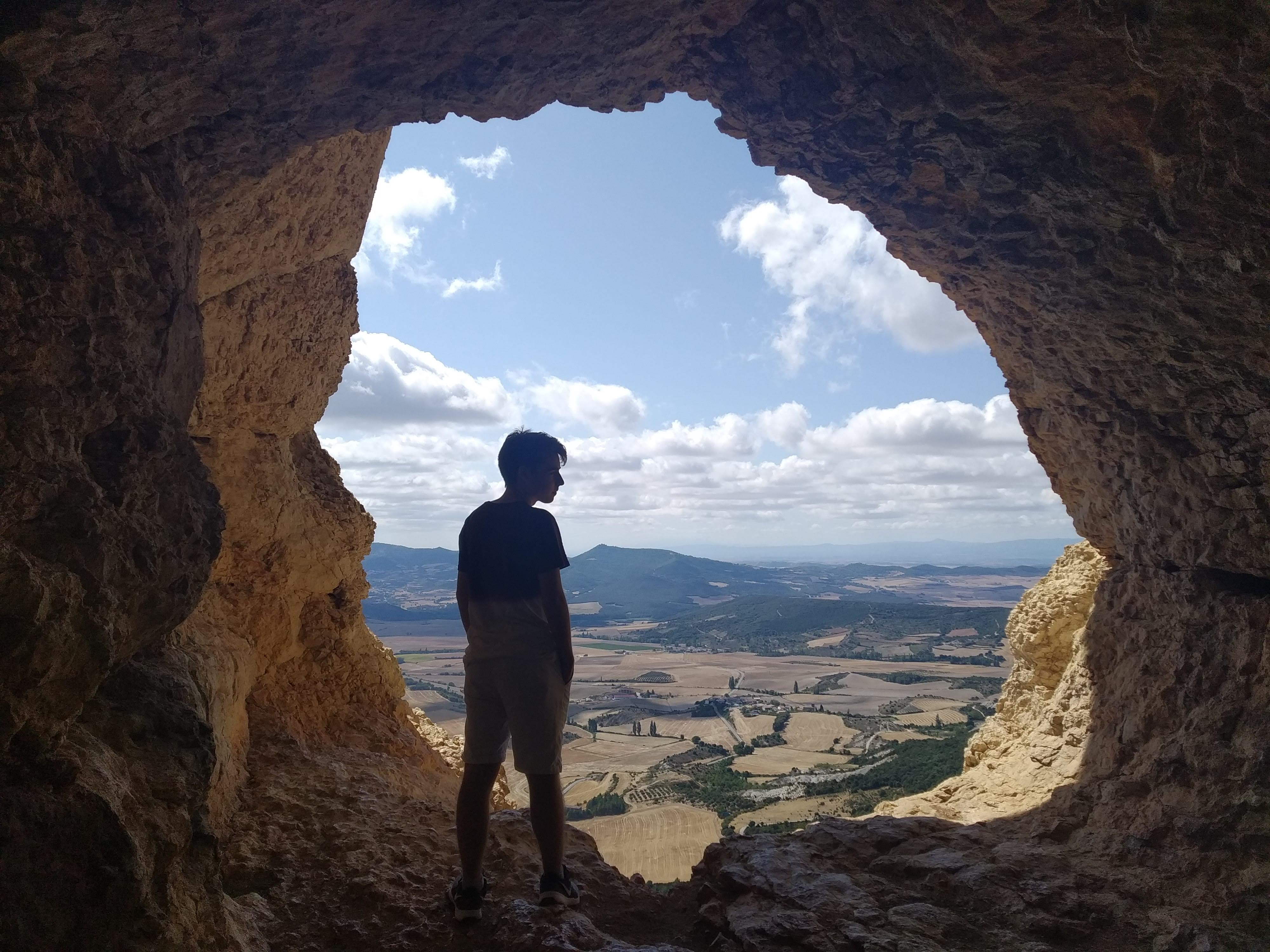 Vista del Ojo de San Prudencio desde el interior de la cueva, con la silueta de un joven recortándose ante el paisaje del valle de Allín